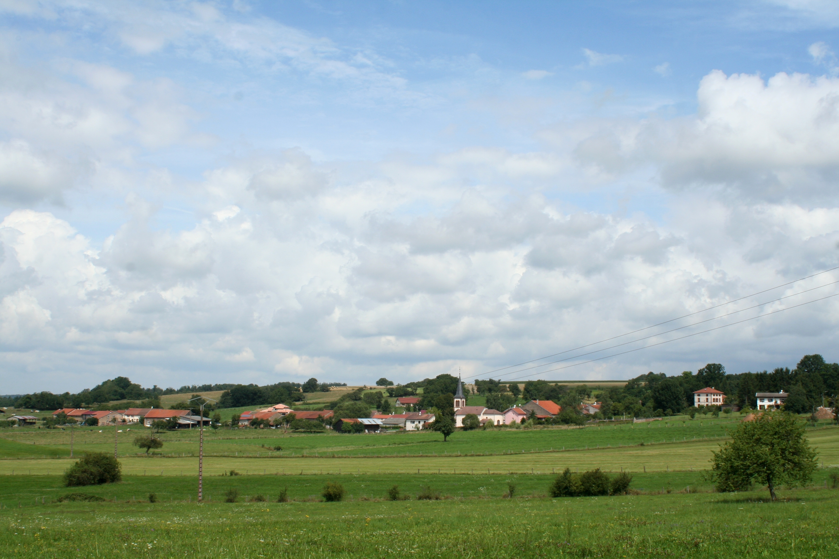 Vue lointaine de Ménarmont (Vosges)